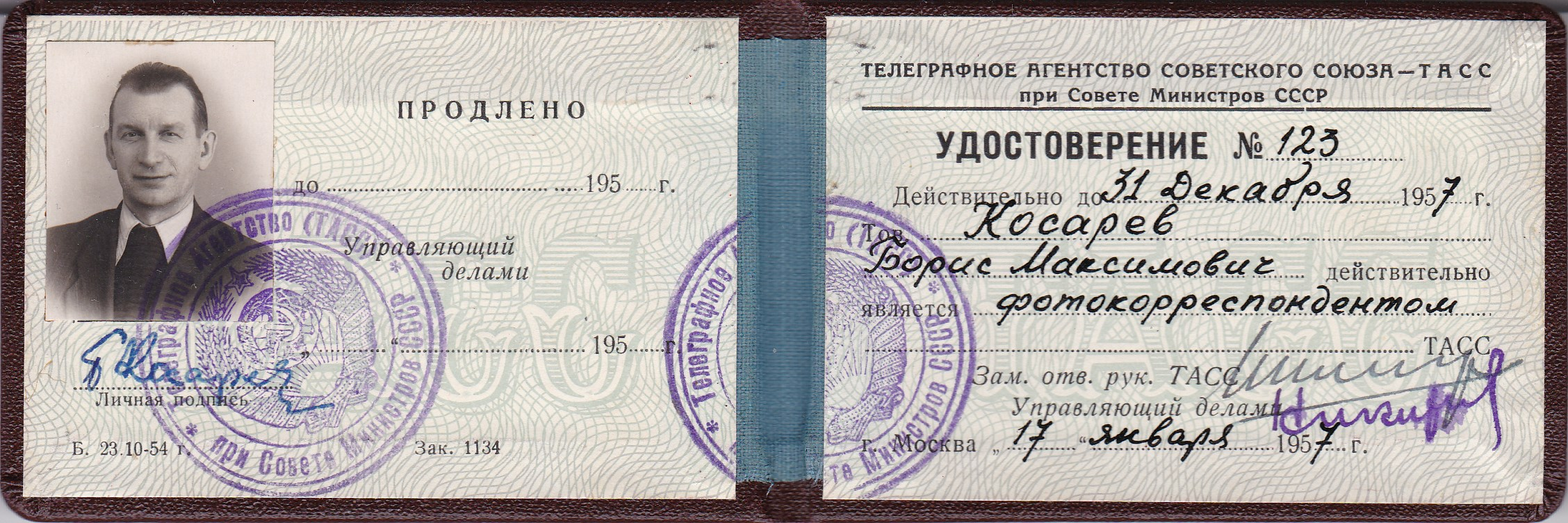 Удостоверение фотокорреспондента Бориса Косарева, ТАСС